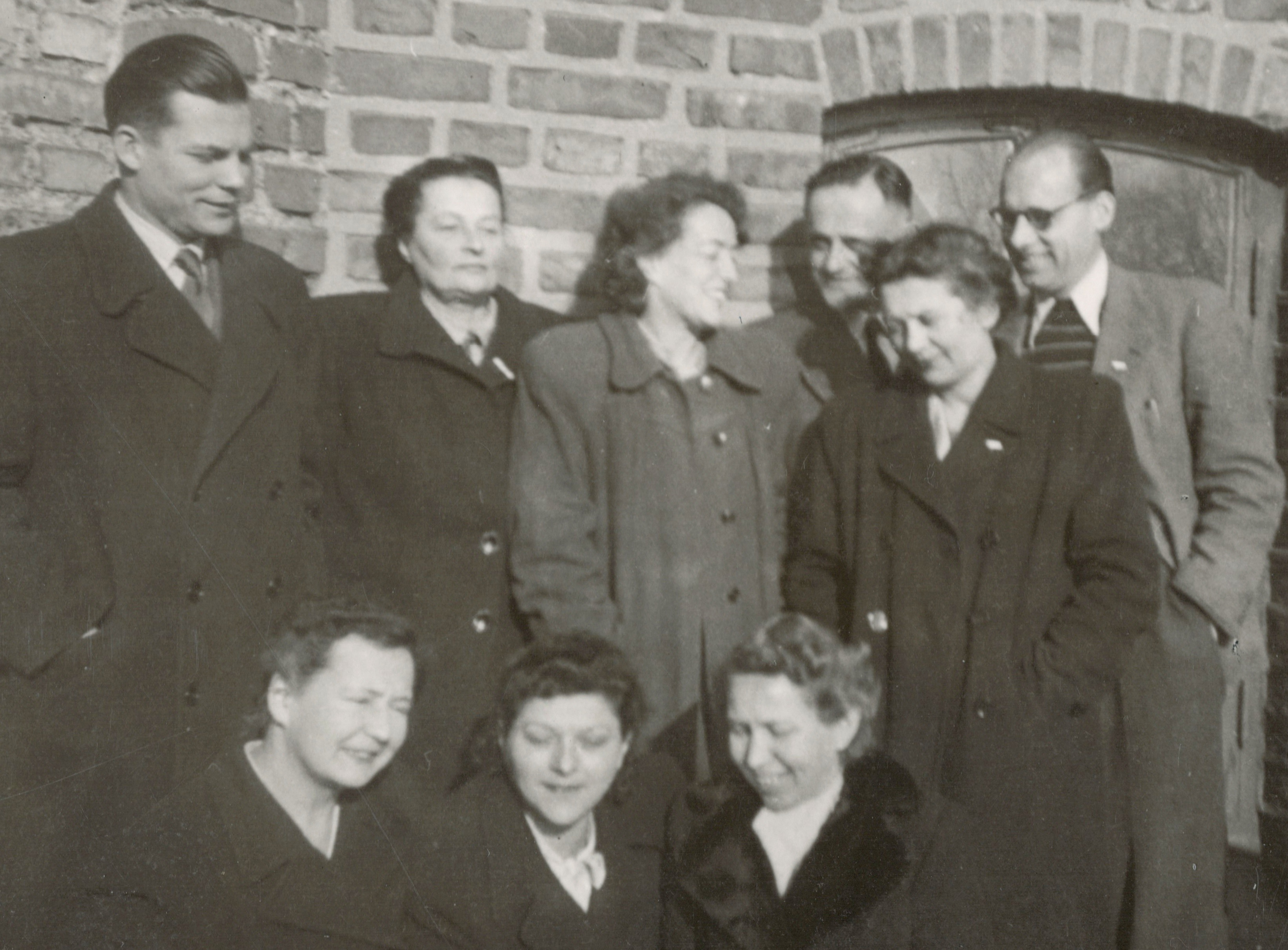 Polski Instytut Źródłowy w Lund - Z lewej u góry: Bożysław Kurowski, Ludwika Broel Plater, Carola Łakocinska, Jerzy Nowaczyk, ..., Zygmunt Łakocinski Na dole z lewej: Helena Dziedzicka, Luba Melhior, Halina Strzelecka.